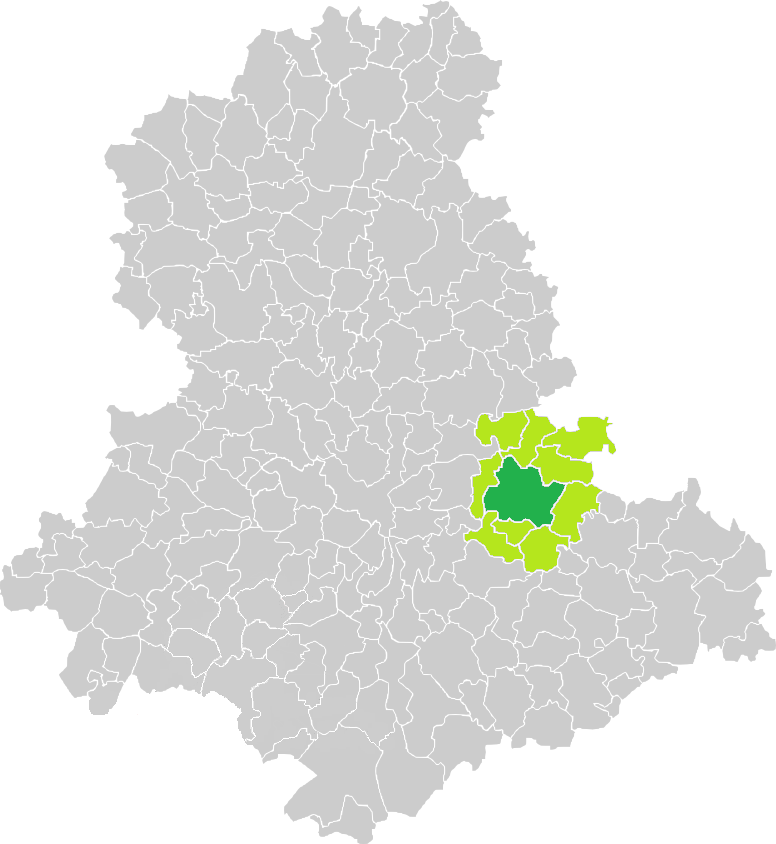 Carte de situation de la commune de Saint-Léonard-de-Noblat(en vert foncé) dans le votre Canton (en vert clair) sur une carte des communes de la Haute-Vienne